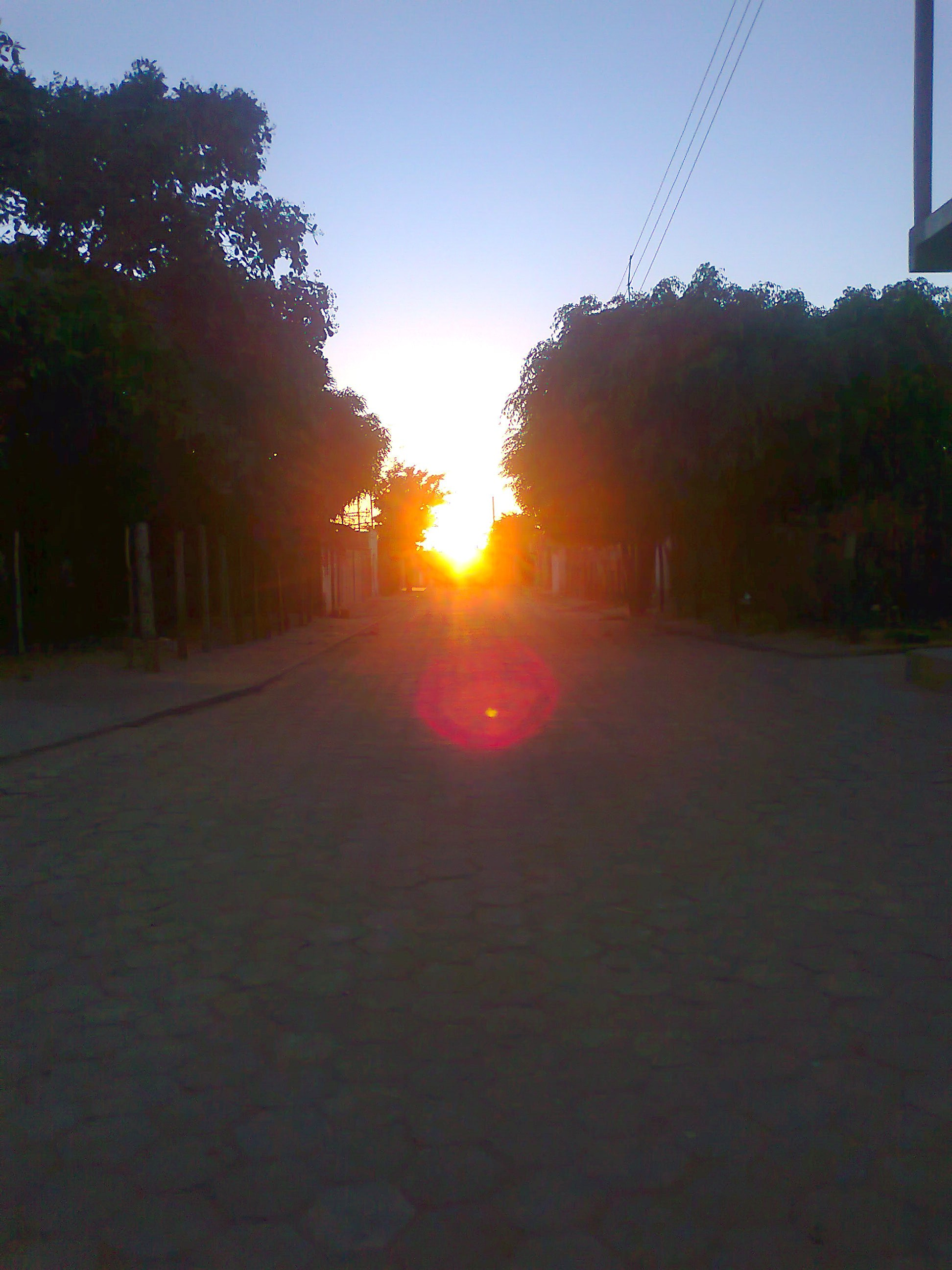 o sol nasce em cada rua sobradiense